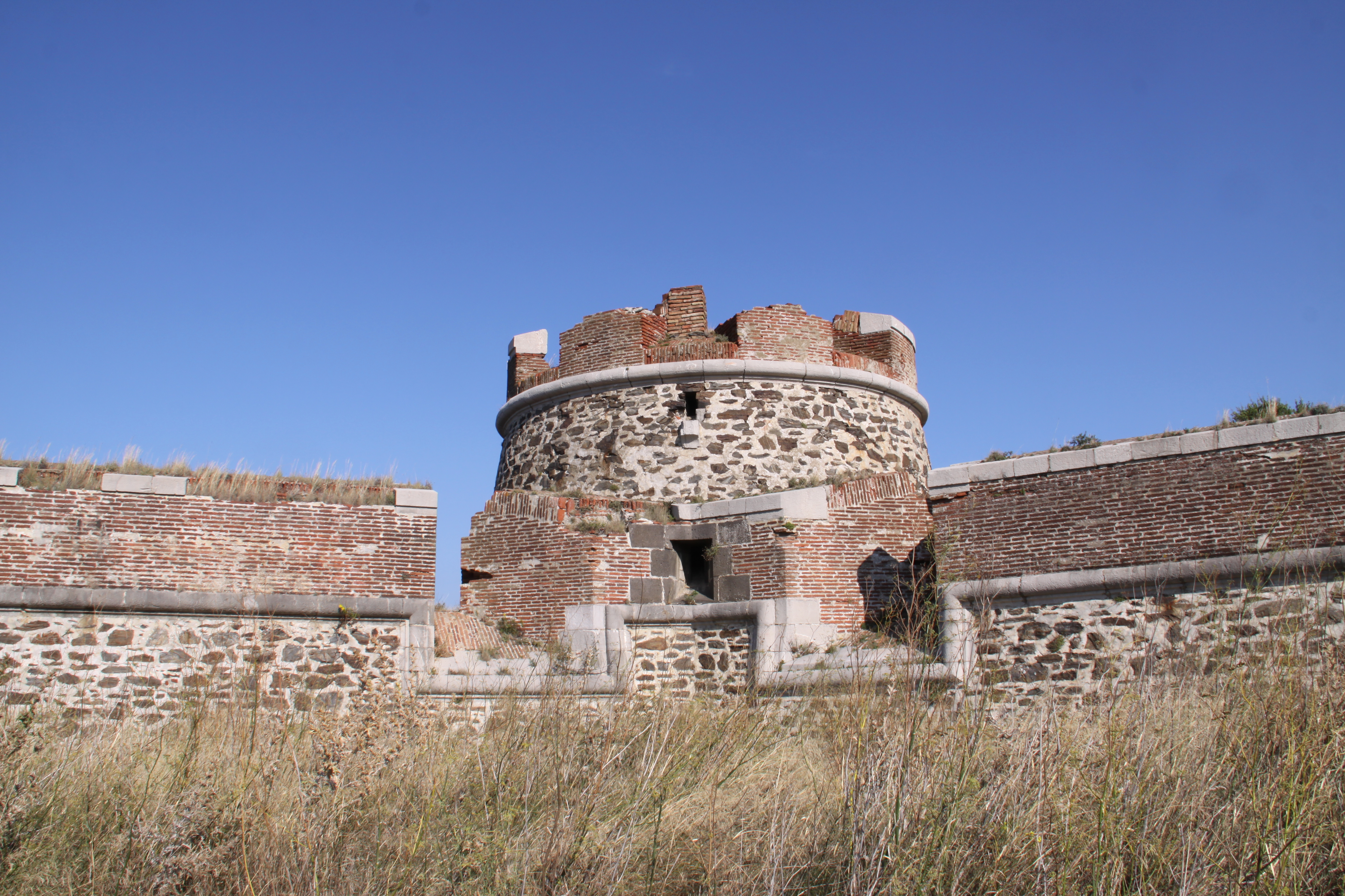 La Tour de l' Etoile (appelée aussi Fort Rond) de Collioure (1ère moitié du 18ème siècle) est un édifice militaire. La Tour de l' Etoile fait partie de l' ensemble "Fort Carré, Tour de l' Etoile et caponnière" qui ne forme qu'un seul MH. Monument Historique classé en 1991. PA00104002. Collioure, Pyrénées-Orientales, France